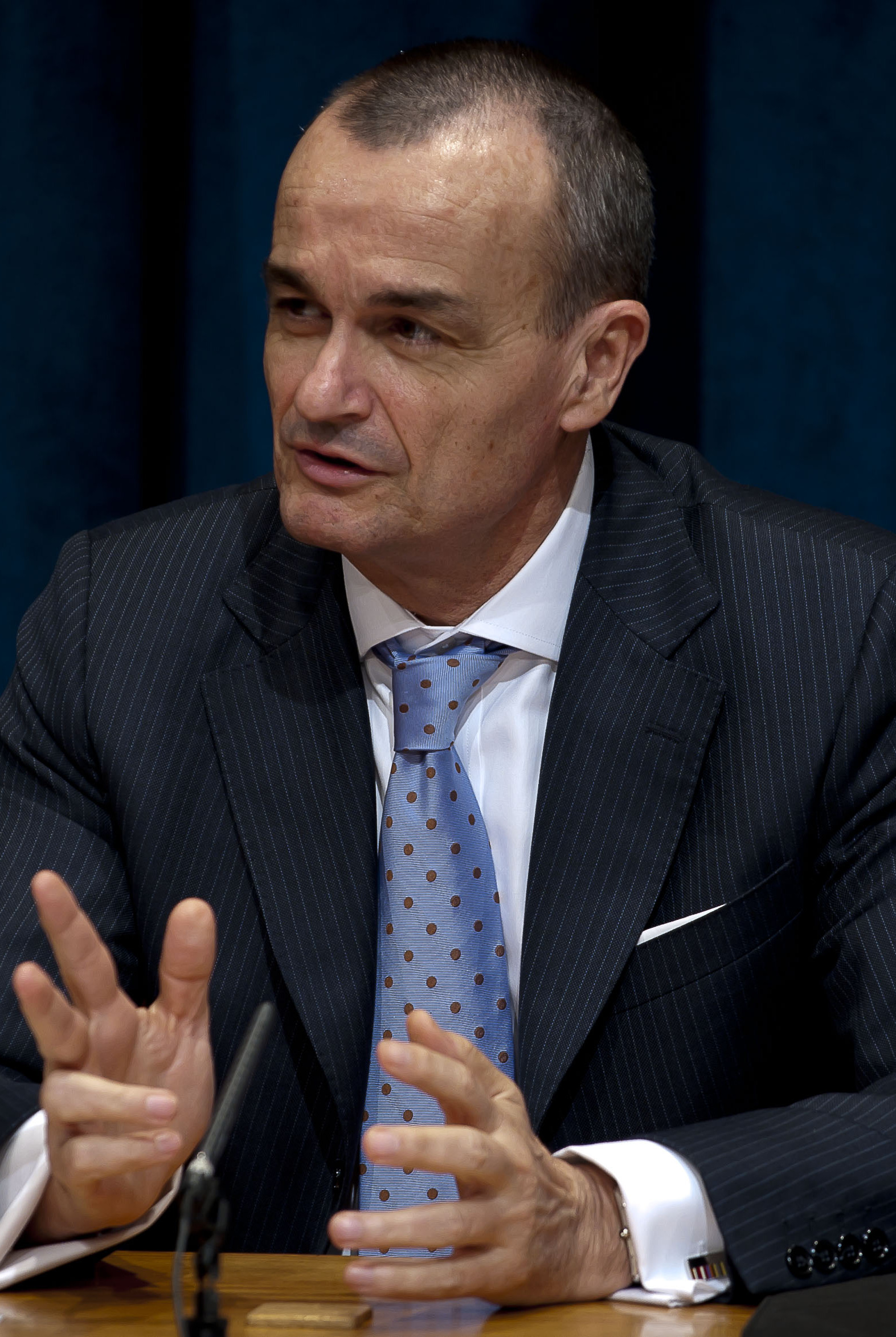 A l'occasion de la présidence française du Conseil de sécurité du mois de mai 2011, Gérard Araud rencontre les médias lors de la traditionnelle conférence de presse de présentation du programme de travail du Conseil (3 mai 2011)